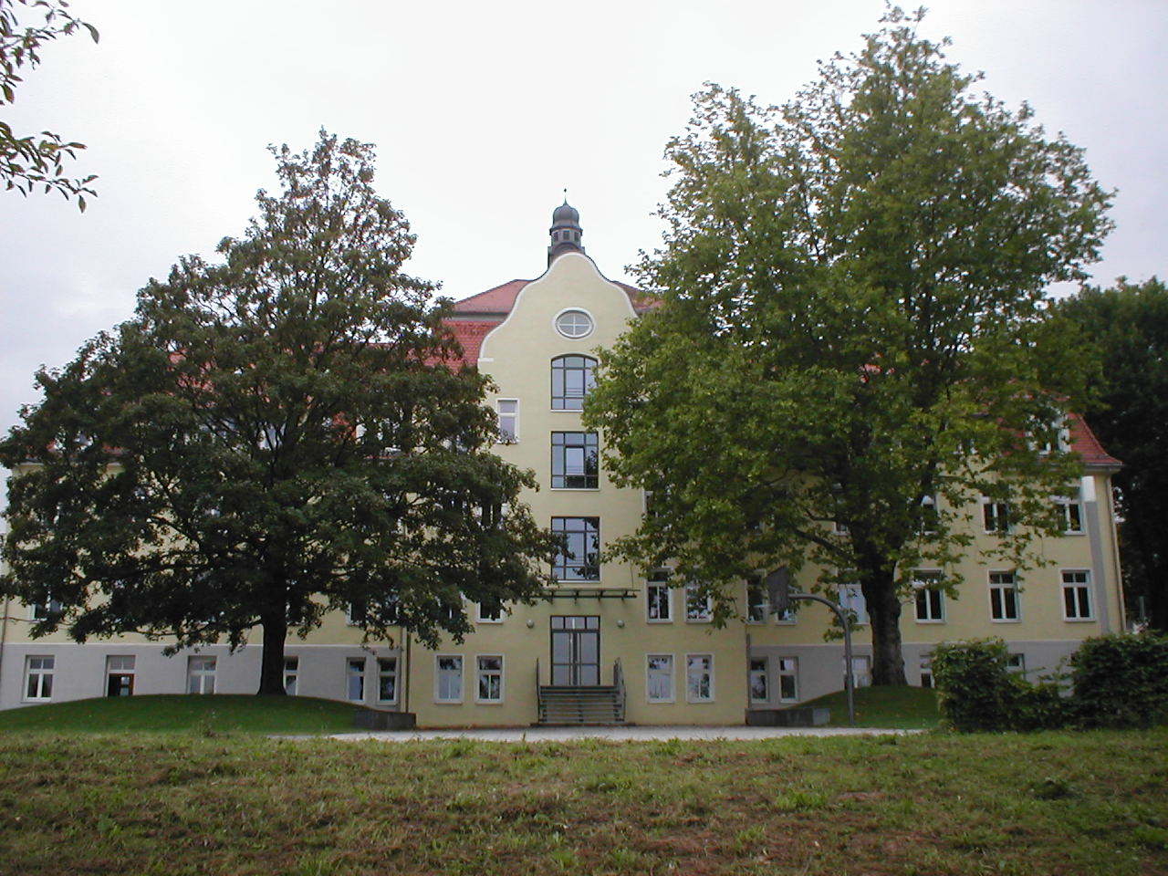 Ehemaliges jüdisches Altersheim Wilhelmsruhe in Heilbronn-Sontheim, heute Alice-Salomon-Schule